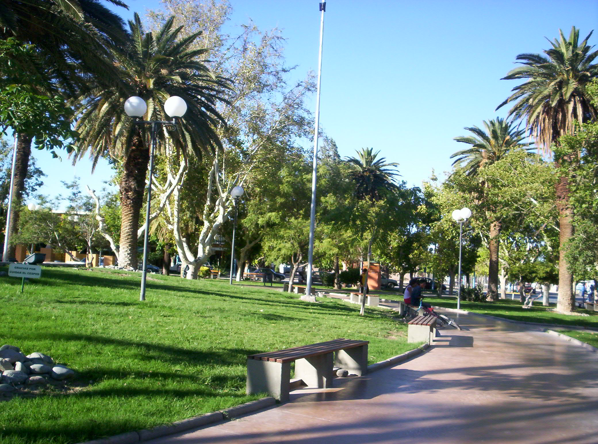 Fotografía de la plaza de Villa Aberastain, departamento Pocito, provincia San Juan, Argentina